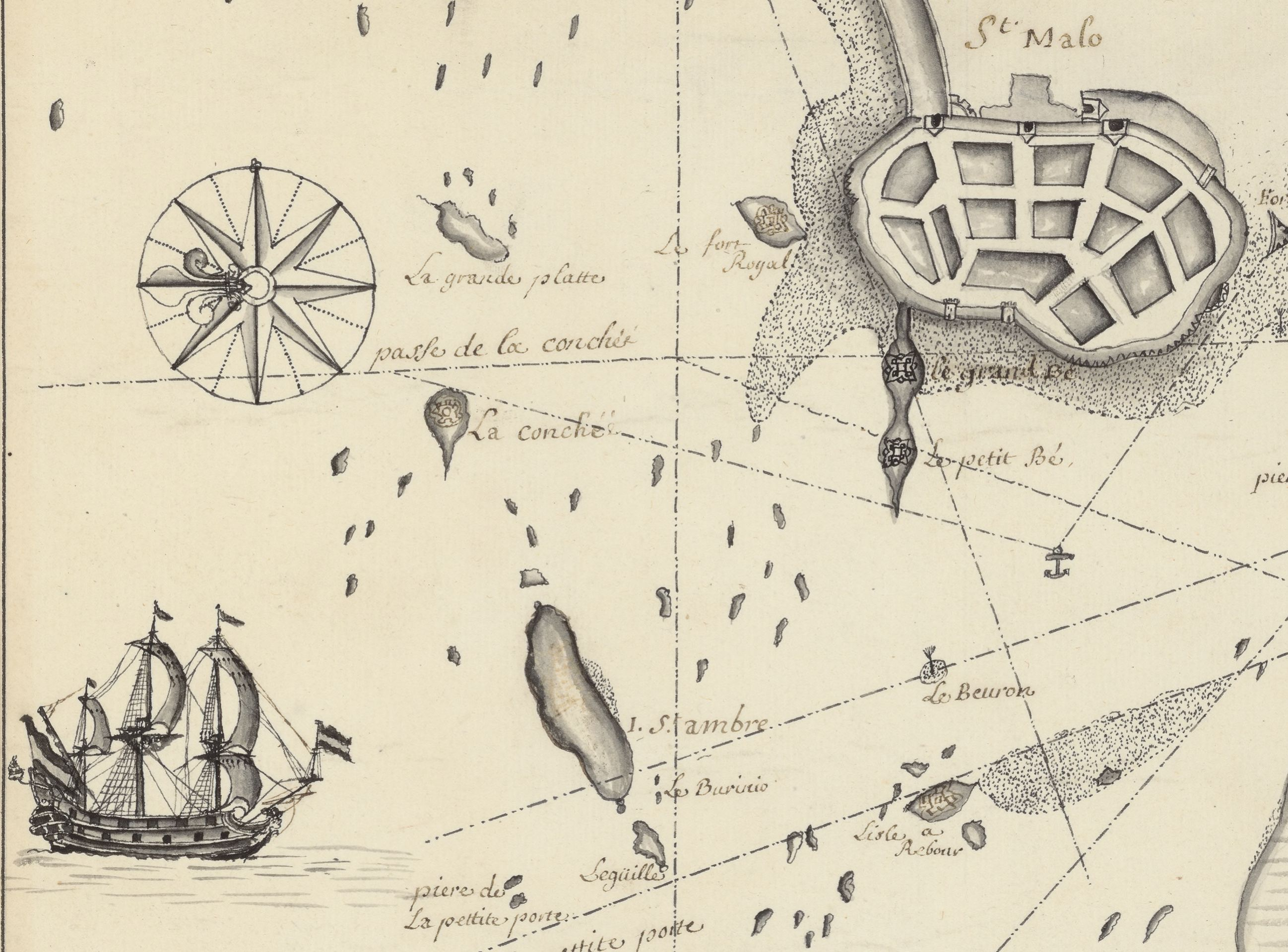 Extrait d'une carte de Saint Malo de 1700 montrant l'île de Cézembre, orthographiée St ambre. Titre de la carte : "Carte de la rade de Saint Malo et la maniere d'y entrer".